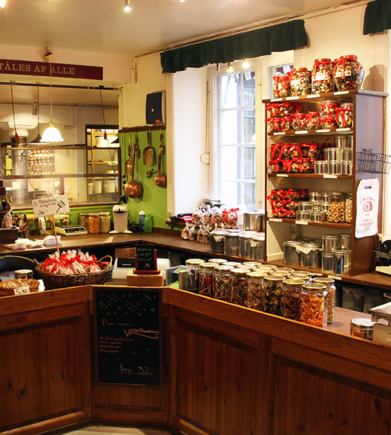 Sømods Bolcher gamle butik i Nørregade 36B